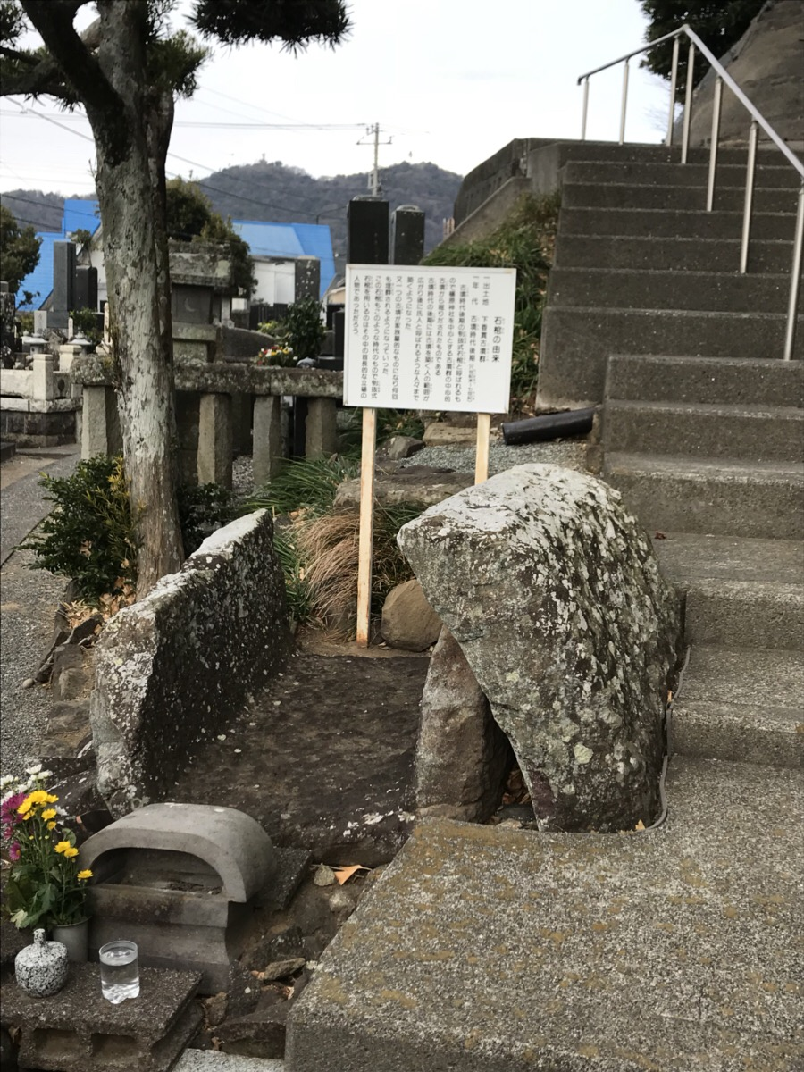 妙蓮寺石棺